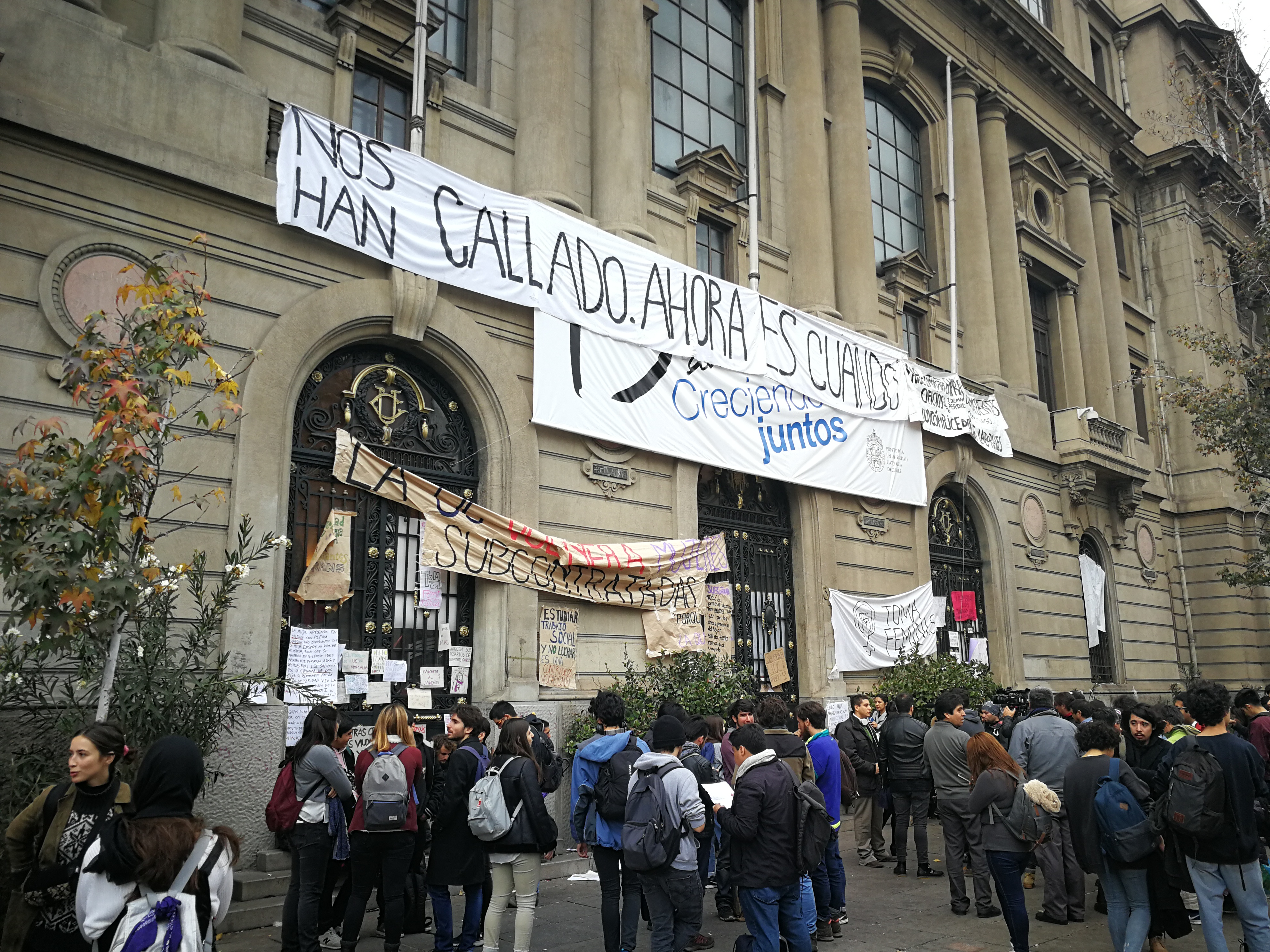 Imagen de la toma feminista en la casa central de la Pontificia Universidad Católica de Chile (PUC) en 2018.